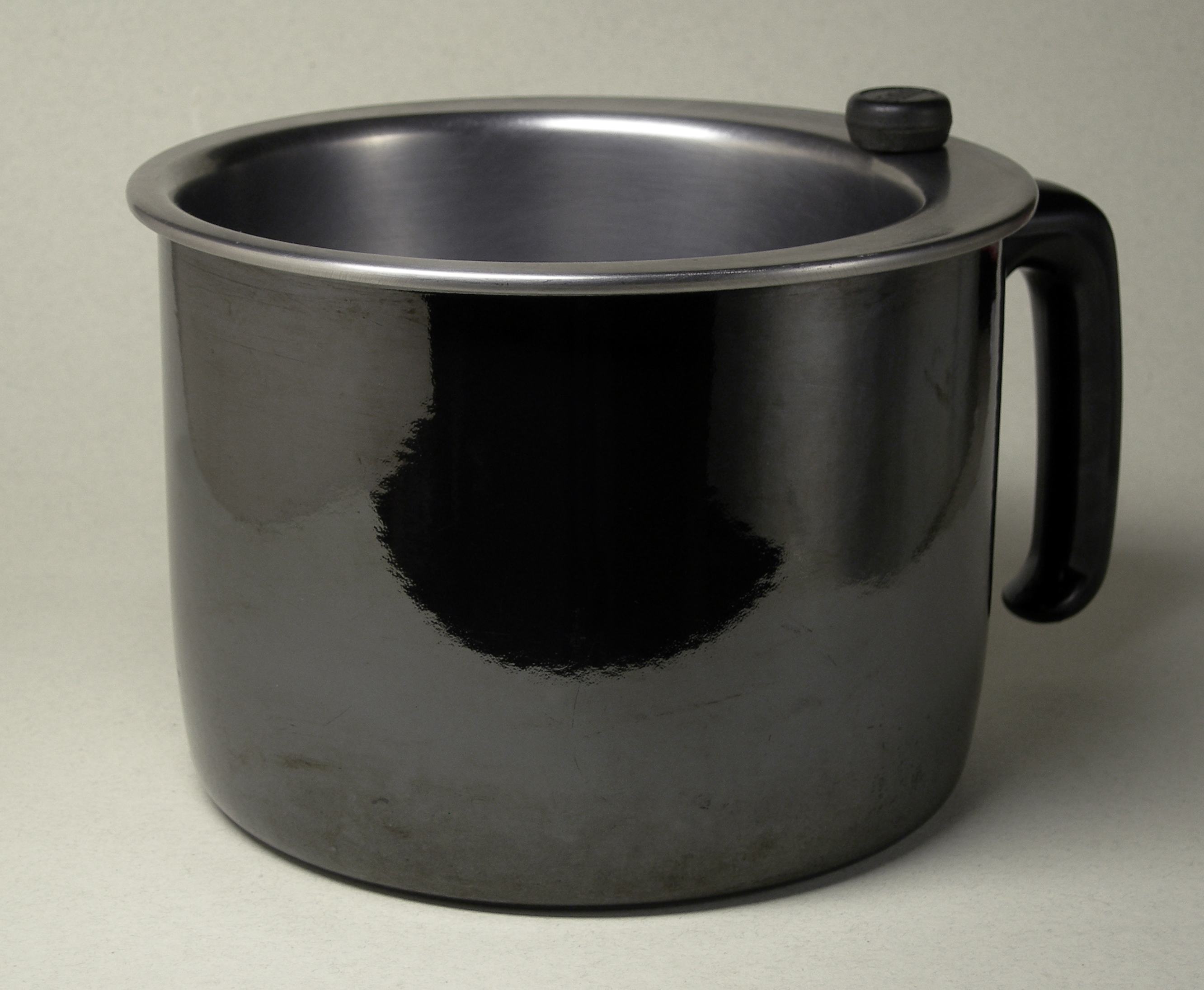 Simmertopf